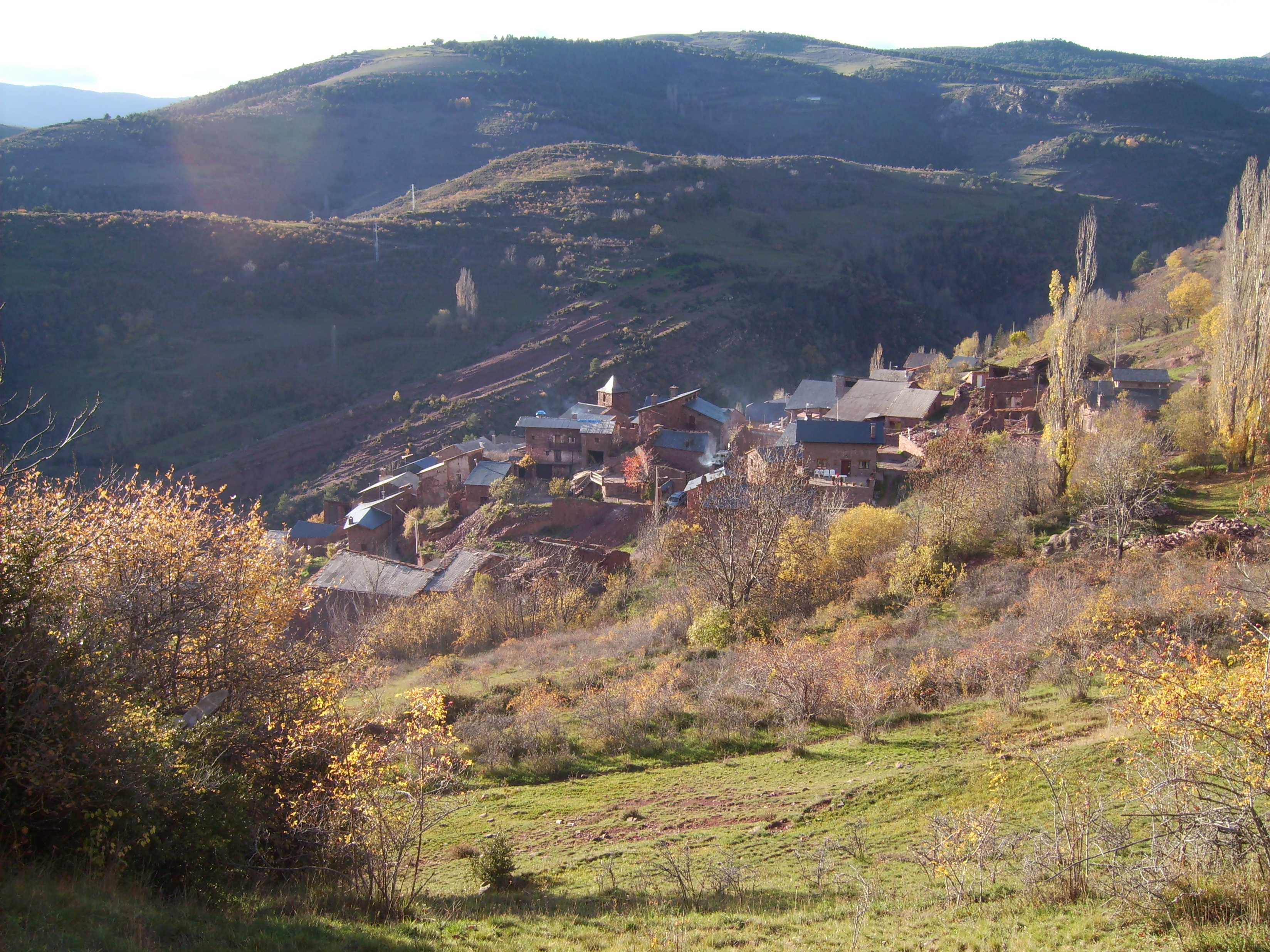 Guils del Cantó, Alt Urgell, Catalonia